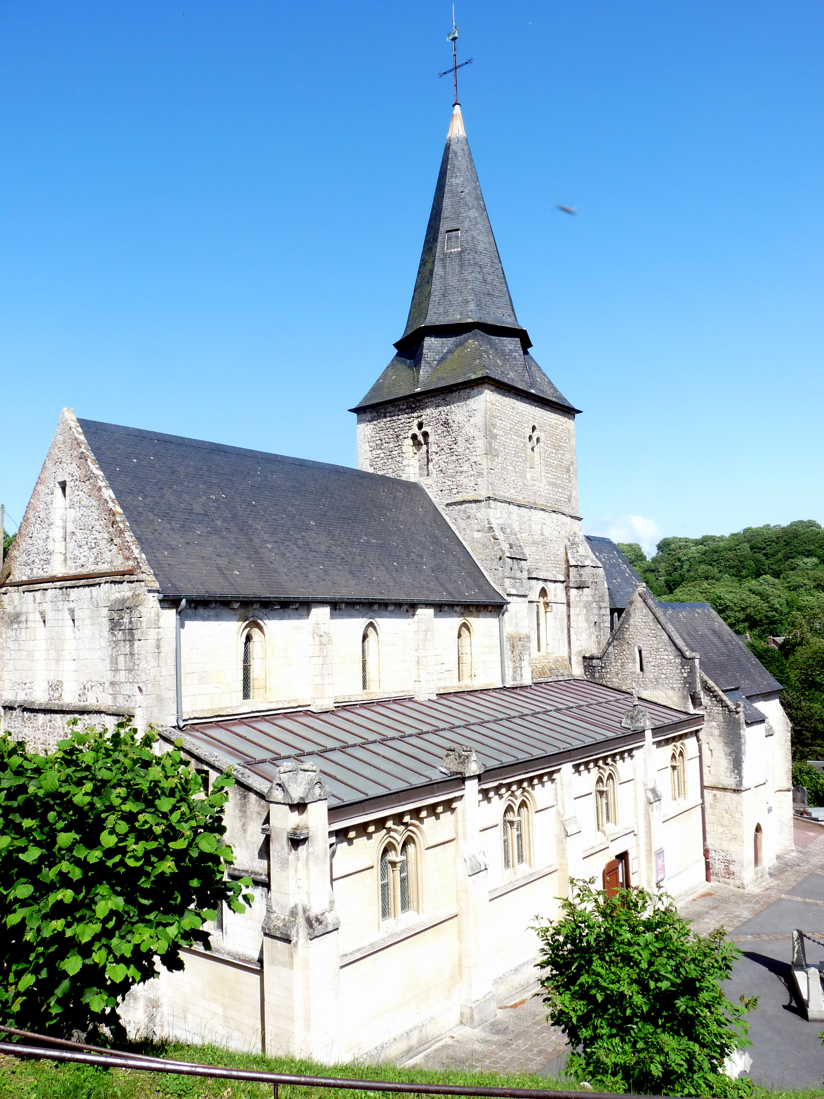 Église Saint-Valéry de Veulettes-sur-Mer